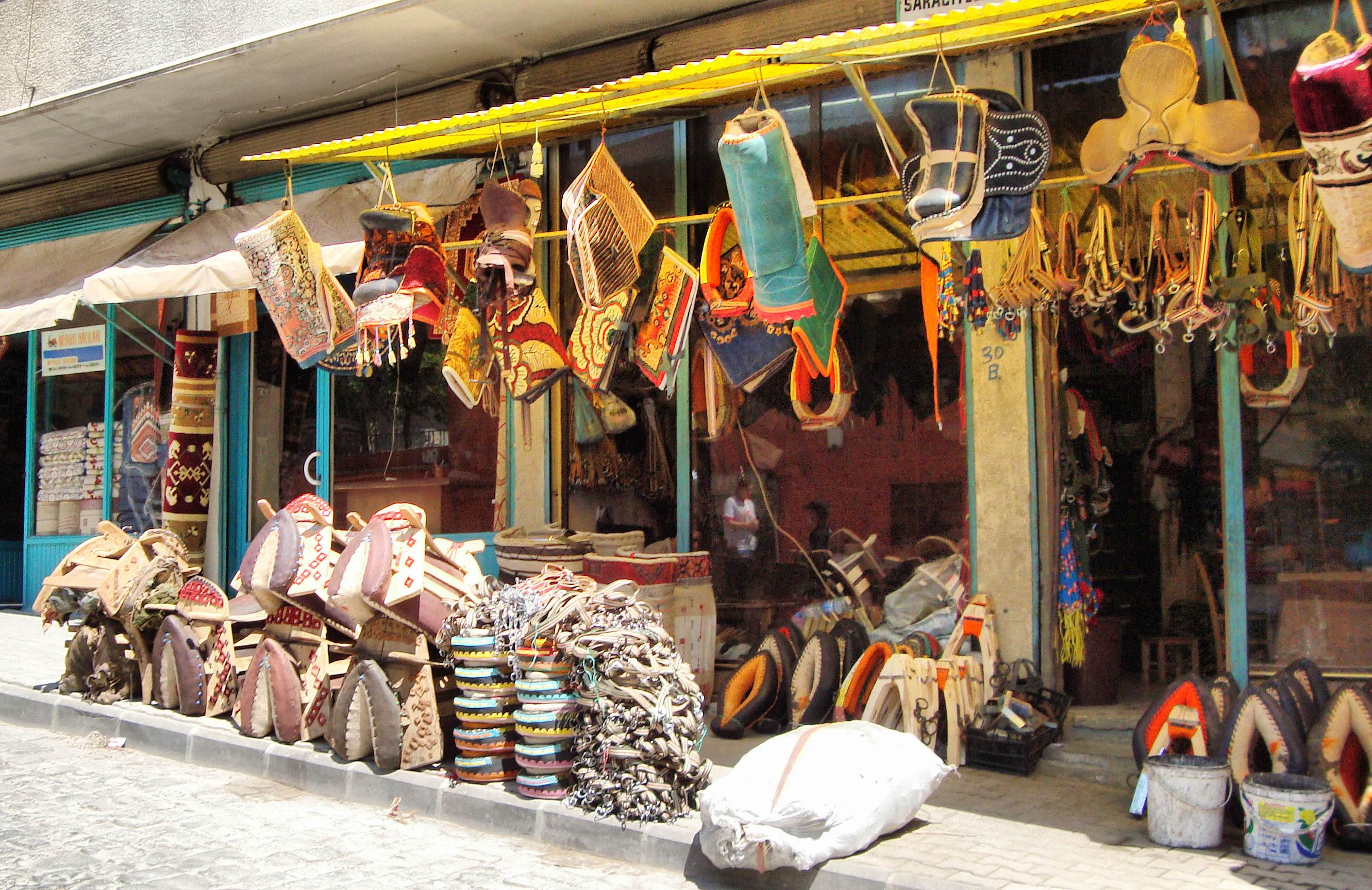 Gaziantep